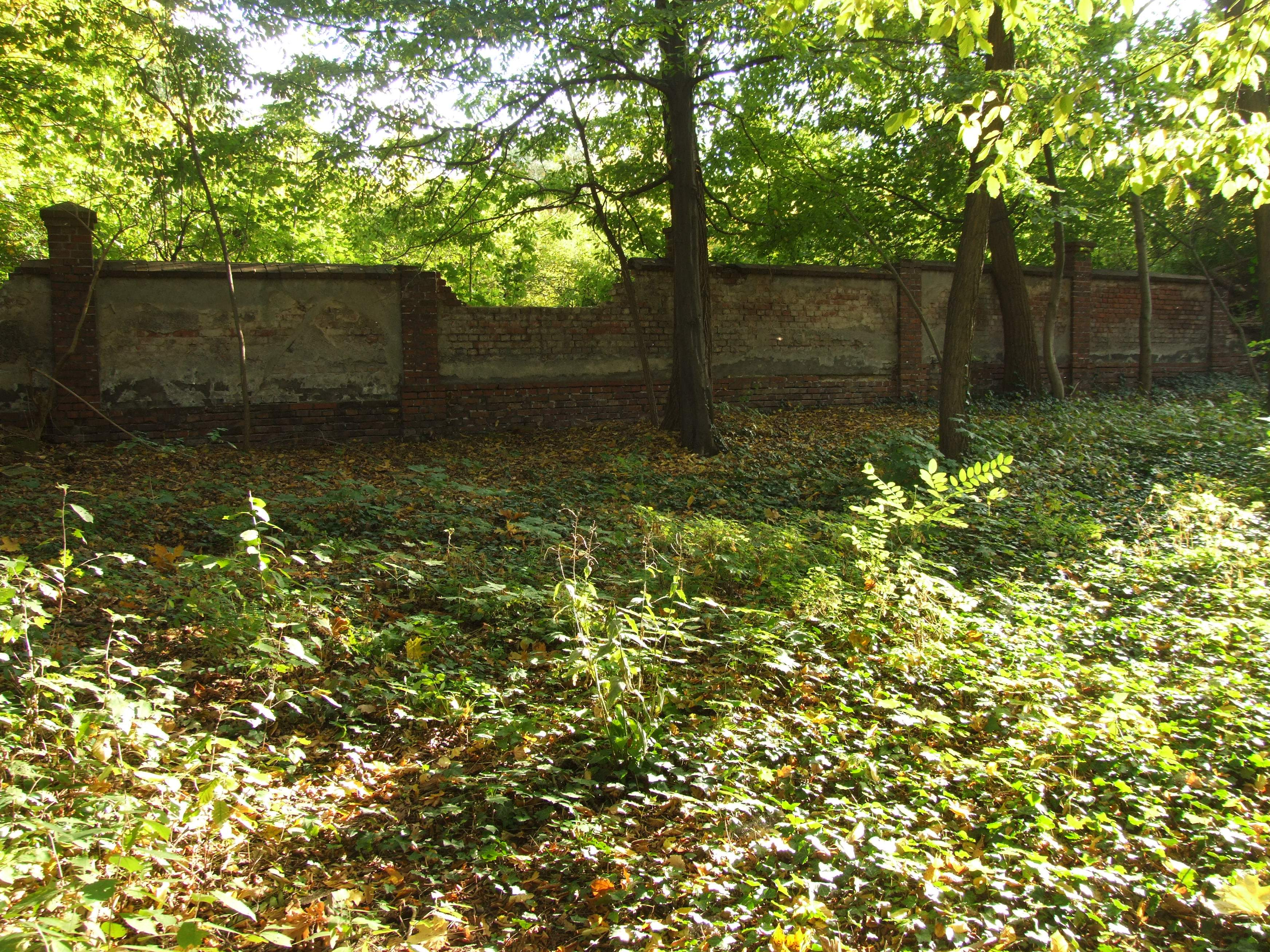 The 19th century wall around the former Jewish cemetery in Zielona Góra Mur okalający były cmentarz żydowski w Zielonej Górze Author: Mohylek 12:57, 17 October 2006 (UTC)